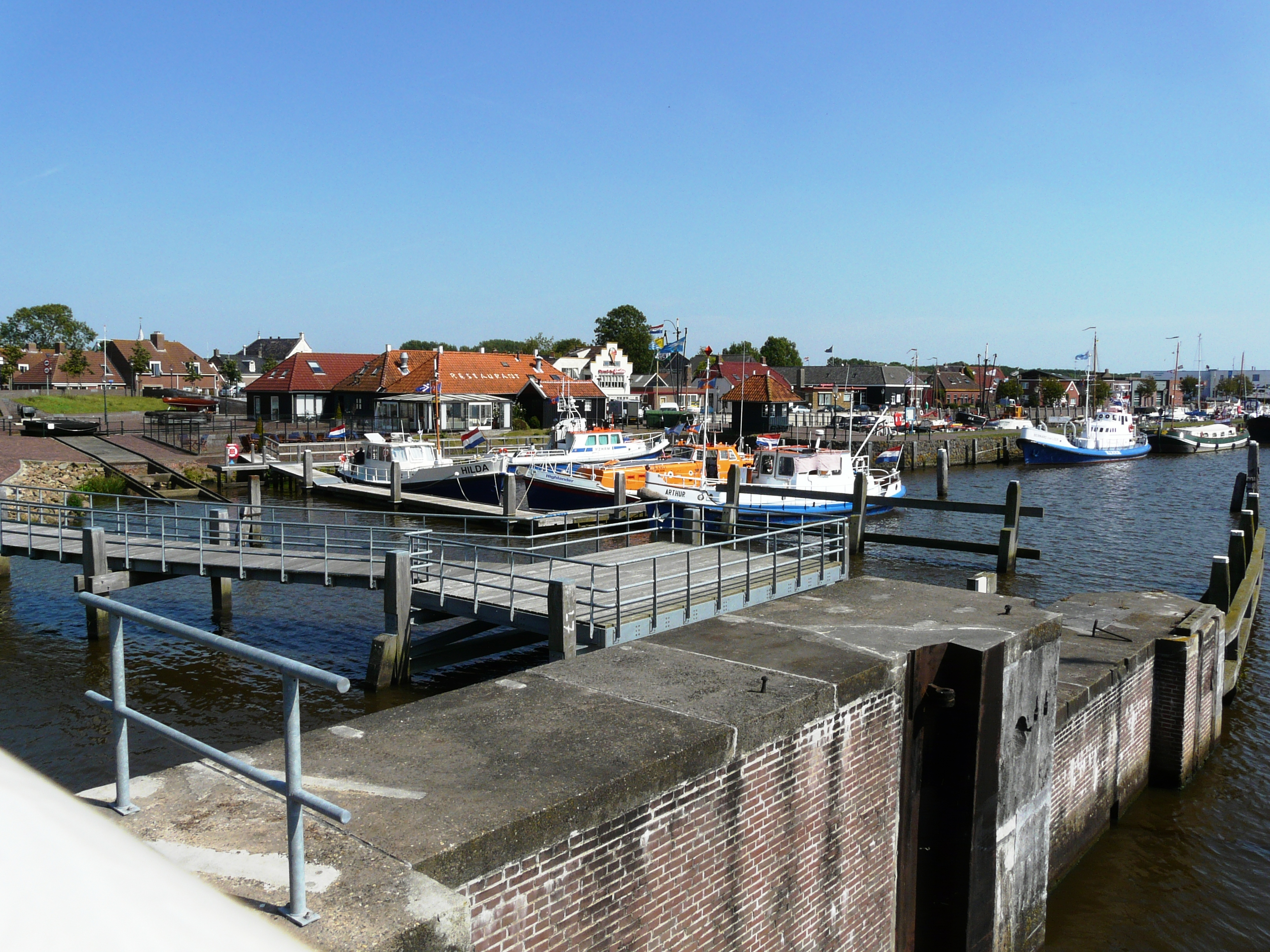 Sâltkamp, Reitdjip